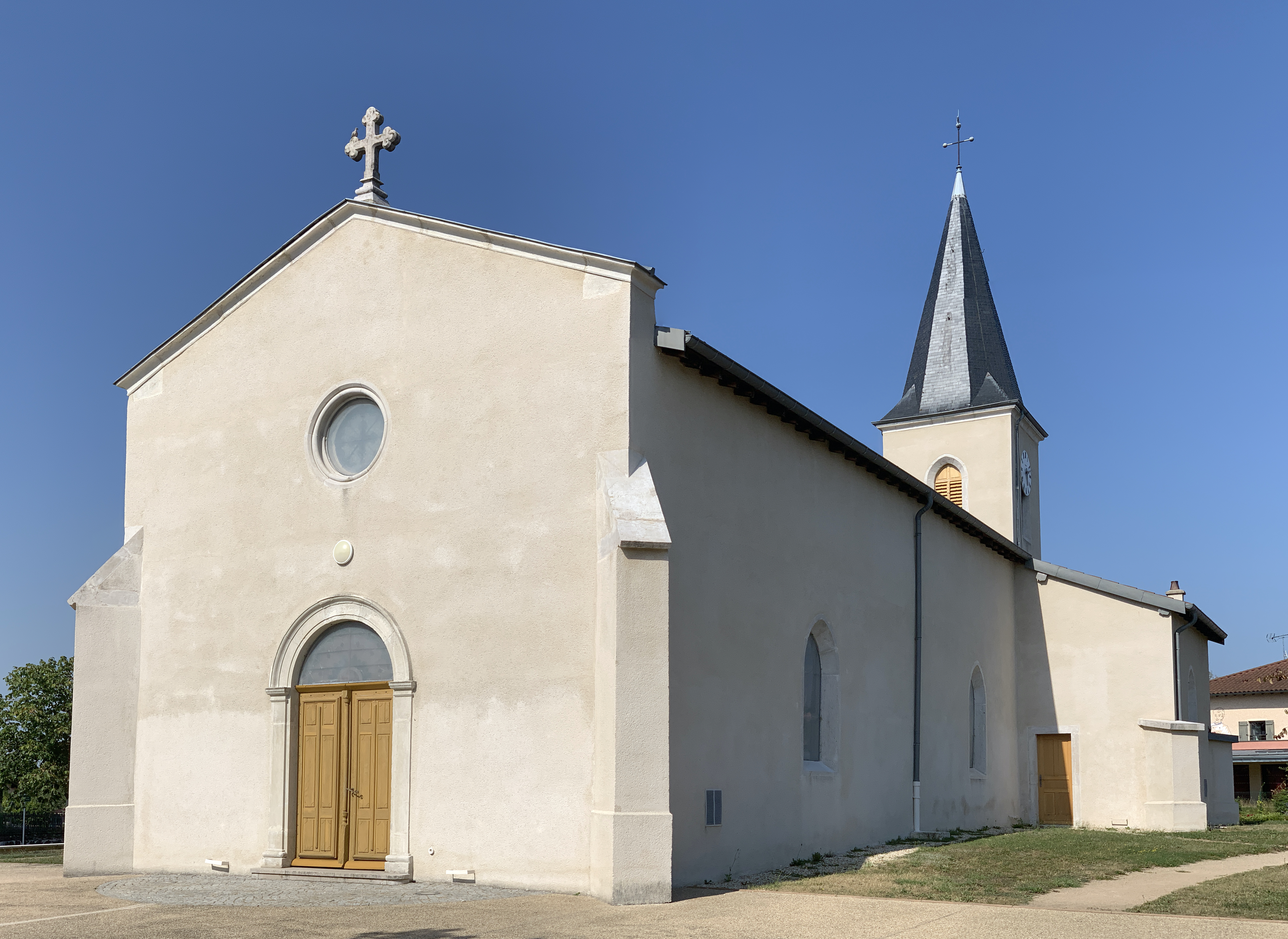 Église Saint-Martin d'Étrez, Bresse-Vallons.